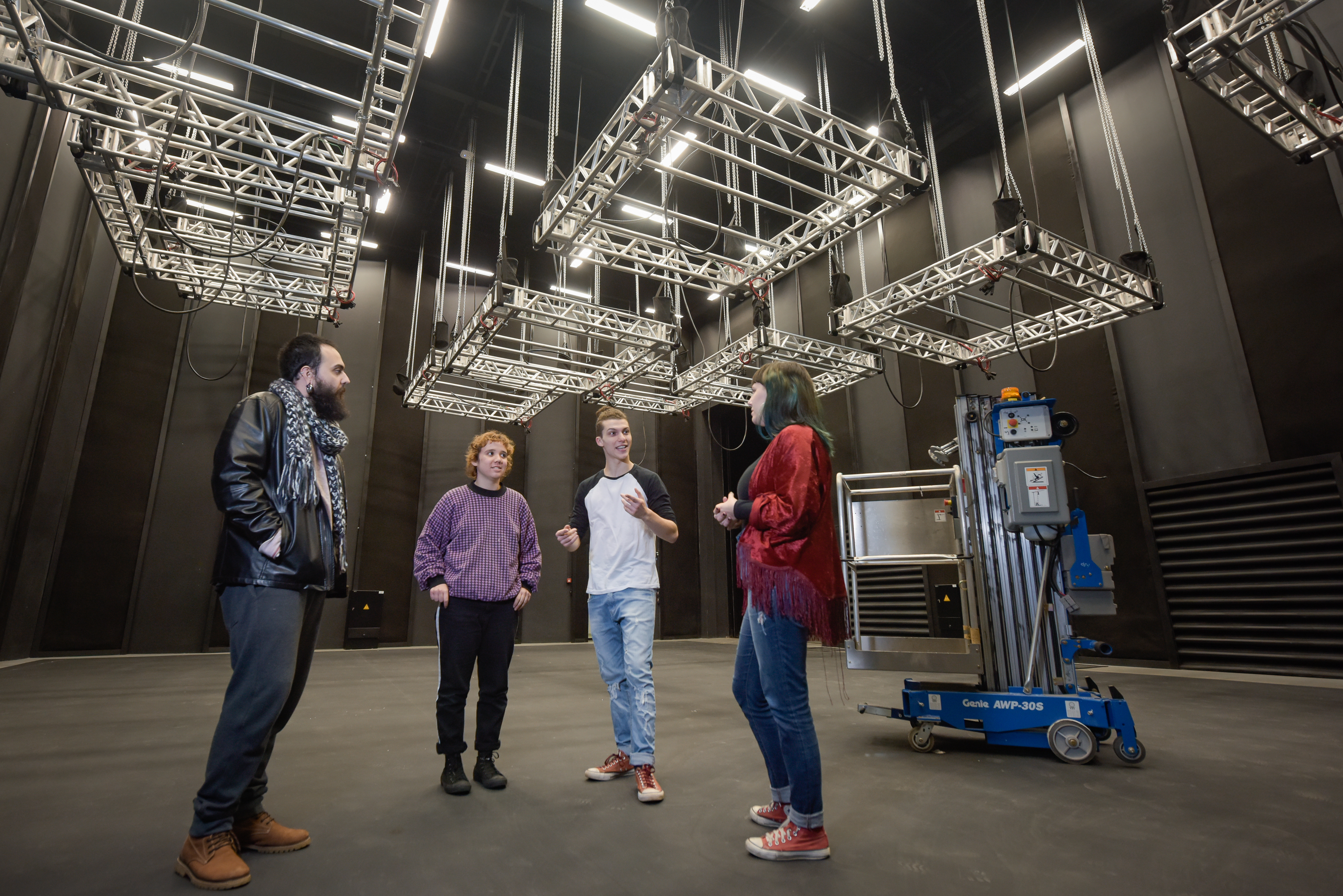 Estúdio Tecna